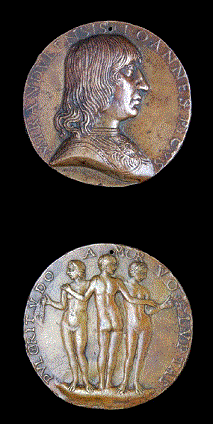 Dargestellt ist auf der Vorderseite ein Portrait des Philosophen, auf der Rückseite "Die drei Grazien".